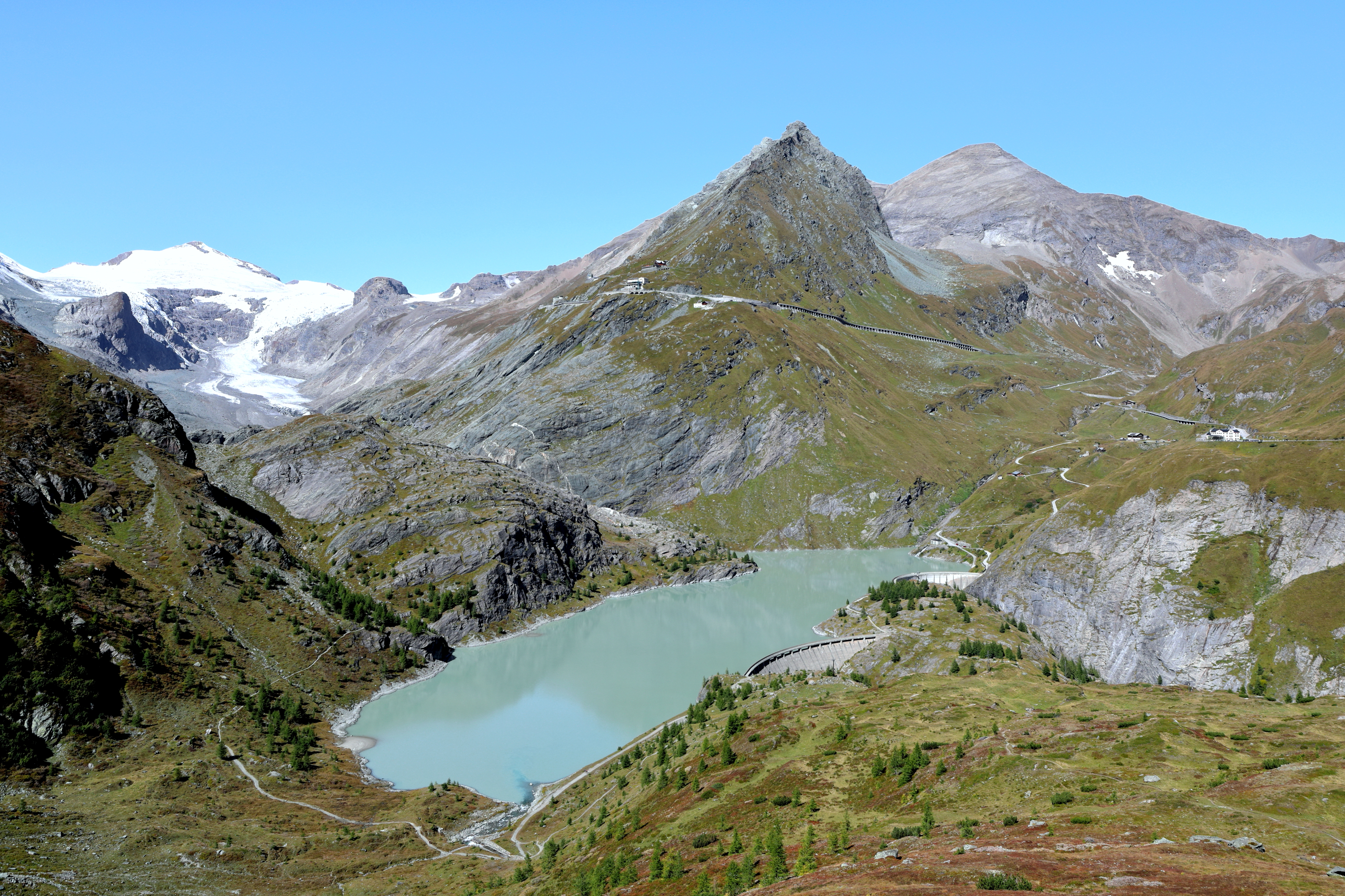 Südsüdostansicht des Stausees Margaritze am Fuß der Pasterze bzw. des Gloßglockners in der österreichischen Gemeinde Heiligenblut am Großglockner in Kärnten und im Hintergrund die Stichstraße der Großglockner-Hochalpenstraße zur Kaiser-Franz-Josefs-Höhe.Der Stausee auf 2000 m Höhe und mit einem Volumen von bis zu 3,2 Mio. m³ Wasser gehört zur Oberstufe des Kraftwerks Kaprun und wurde 1953 fertiggestellt. Er wird durch die 56 m (statisch wirksame) hohe Möllsperre und der 39 m (statisch wirksamen) hohen schwach gekrümmten Margaritzensperre gebildet und speichert die Abflüsse des Pasterzengletschers und des Leiterbaches (verbunden mit einem Stollen). Das Wasser wird mittels dem 11,6 km langen Möllüberleitungsstollen durch den Tauernhauptkamm zum Möllpumpwerk geleitet.